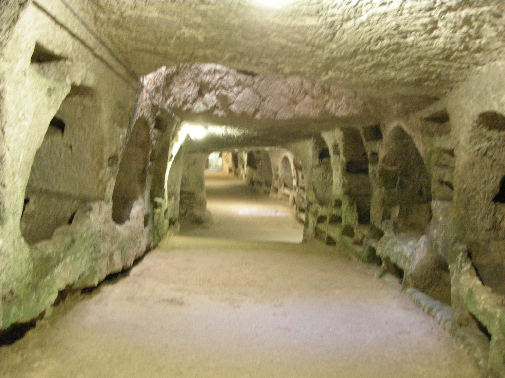 Siracusa, neapolis, catacombe di san giovanni